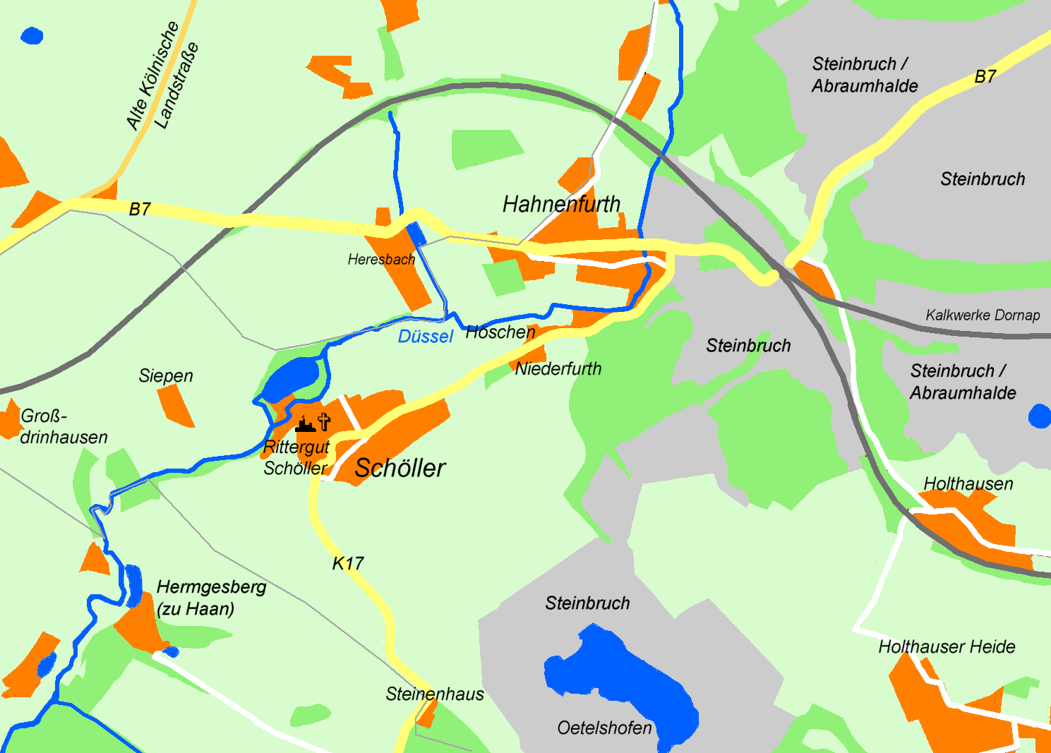 Karte von Wuppertal Schöller und Hahnenfurth, 2005 selbst erstellt